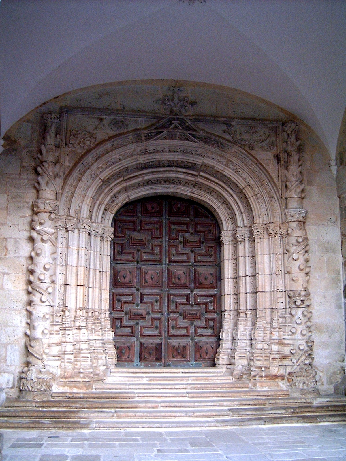 Portal principal da Igreja de Vilar de Frades